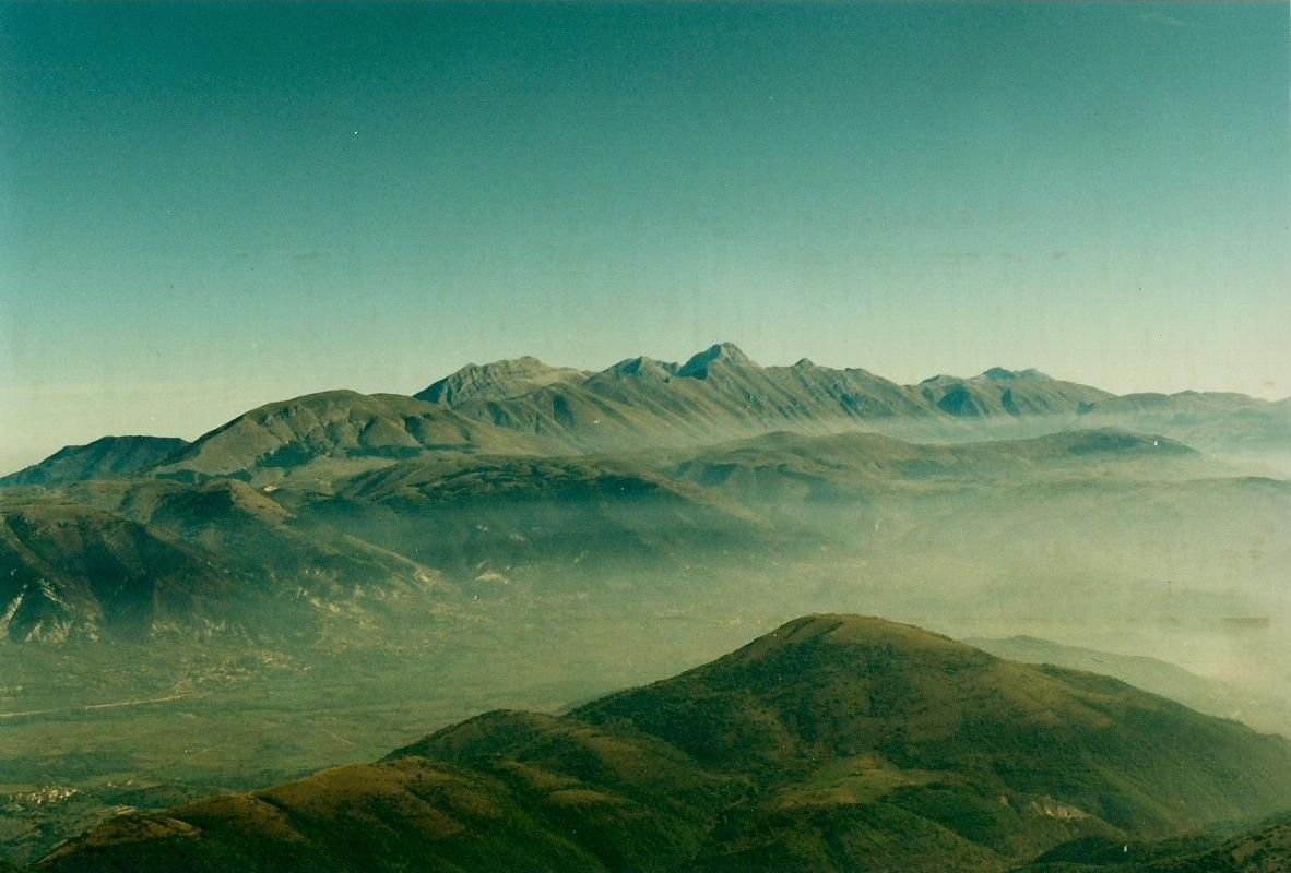 Versante aquilano della catena del Gran Sasso